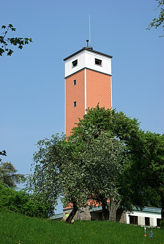 Burgbergturm bei Frankenhardt-Oberspeltach. Blick vom Anstieg nordostwärts auf die Kuppe des Burgbergs.